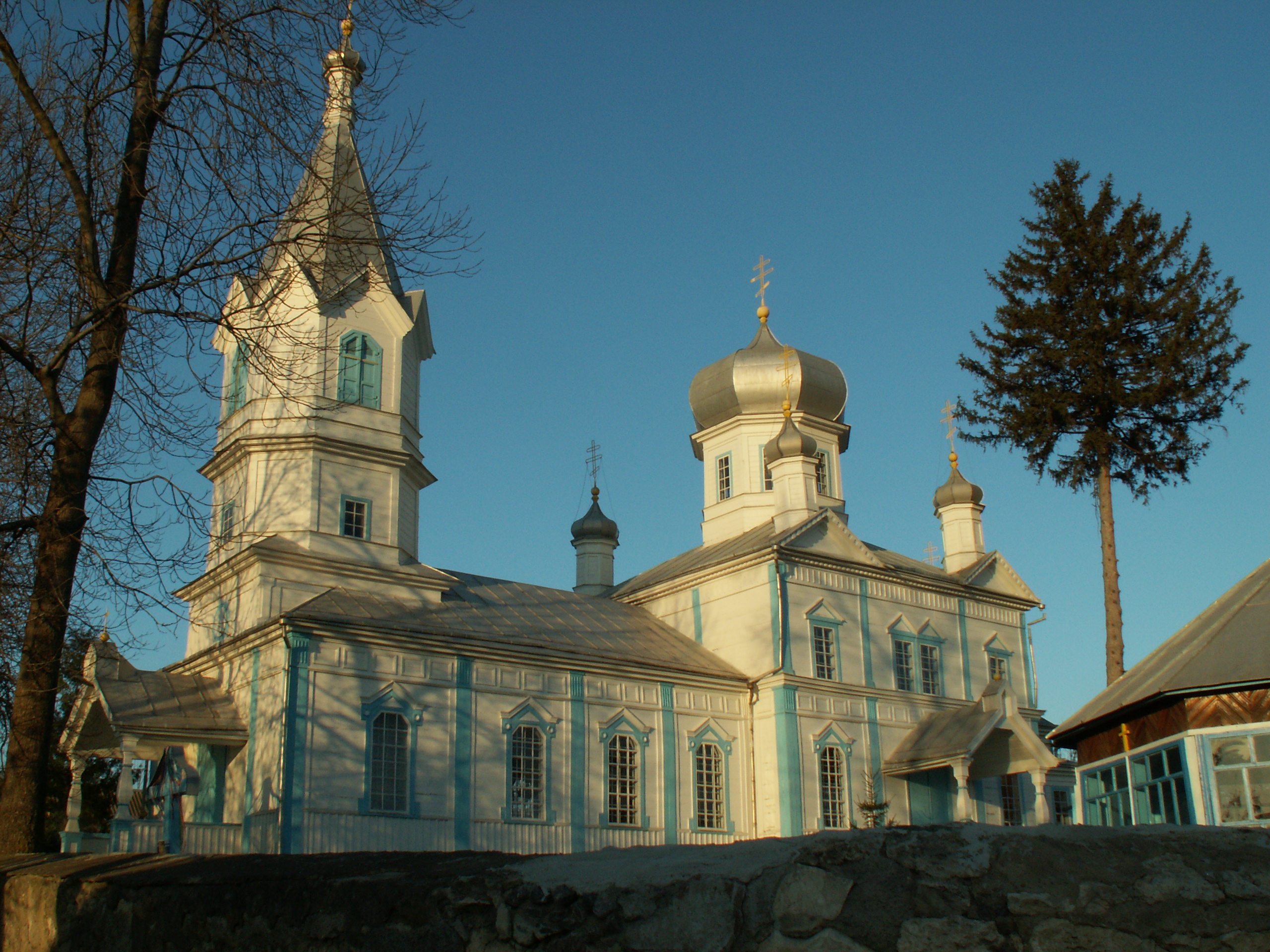 Tsybulivka Church 2 Ukraine